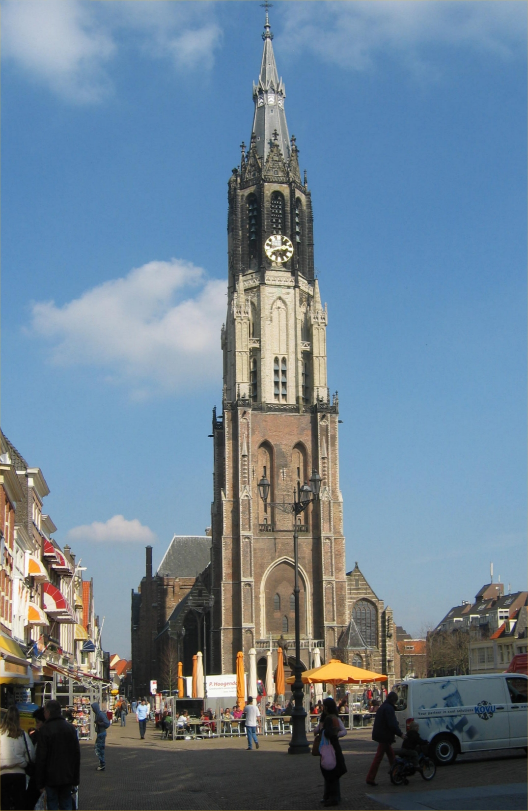 Kirke i Delft